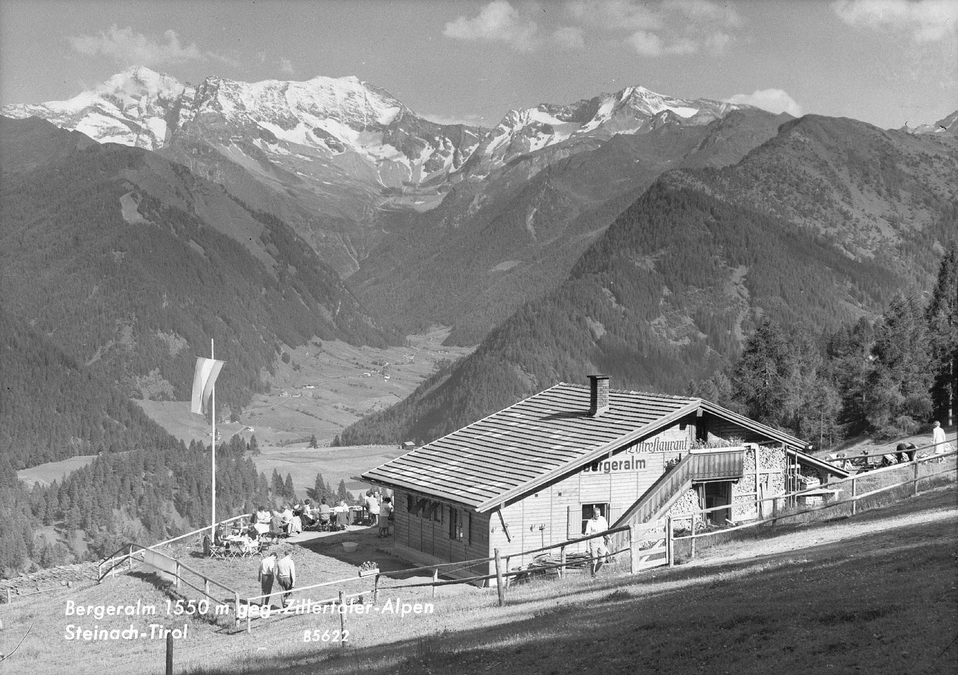 Bergeralm 1550 gegen Zillertaler Alpen / Steinach / Tirol